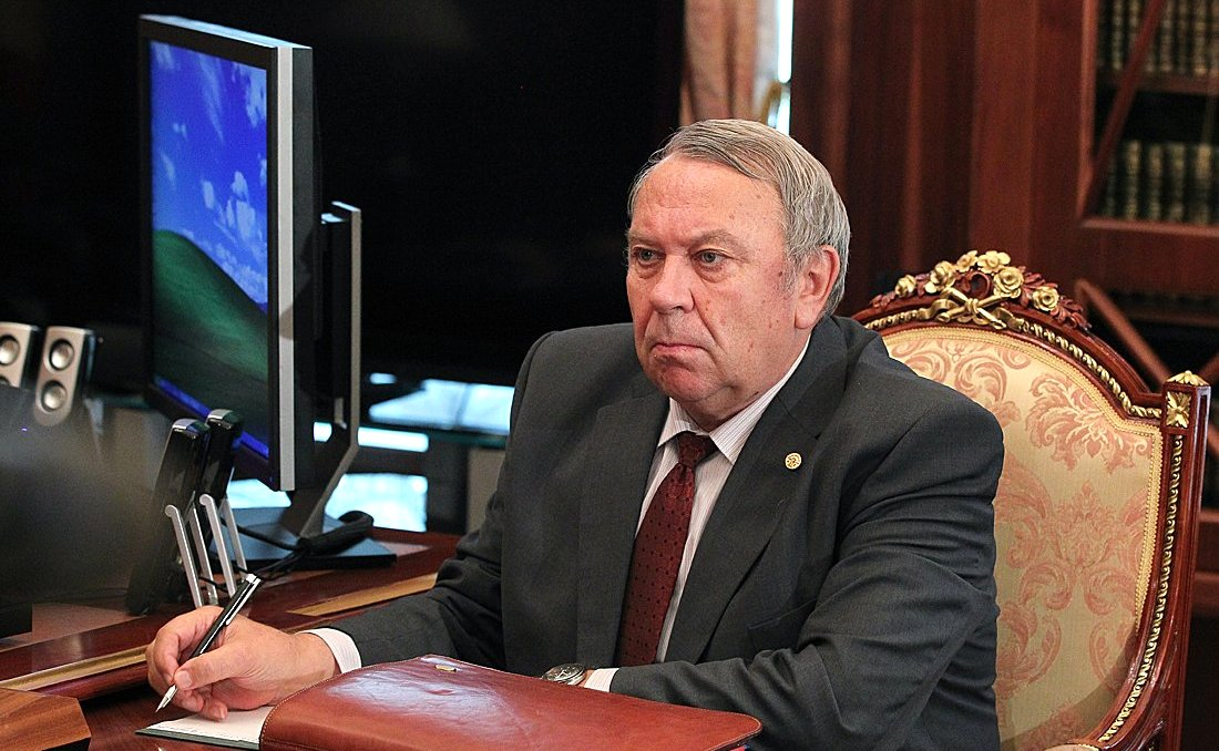 Избранный президент РАН Владимир Фортов на встрече с Президентом России Владимиром Путины